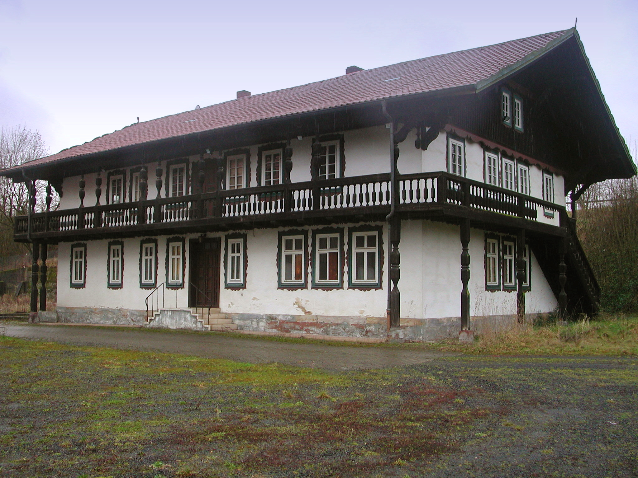 "Schweizerei" im Schlosspark Rosenau bei Coburg